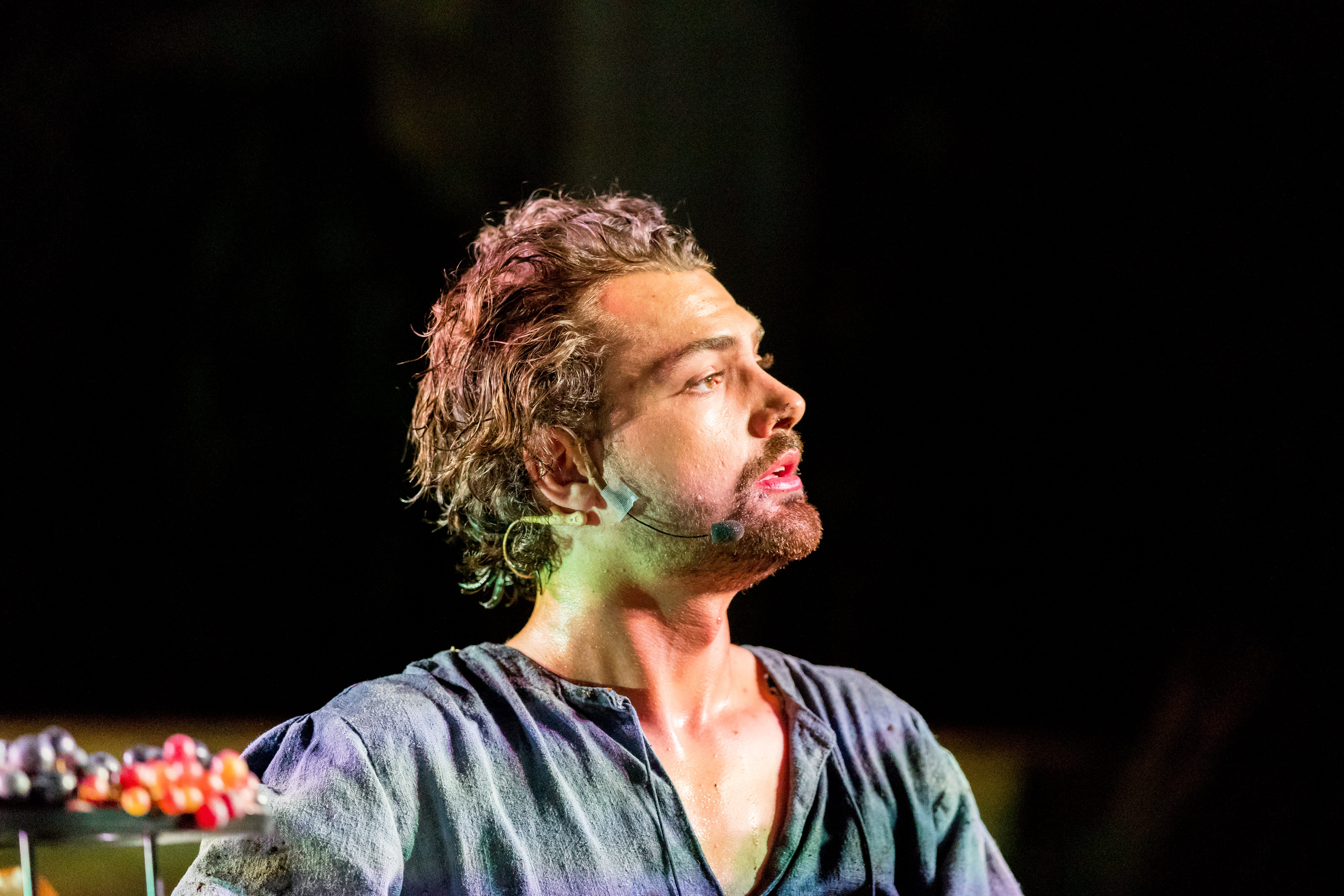 Jimi Blue Ochsenknecht during Nibelungenfestspiele "Siegfrieds Erben" at Wormser Dom, Worms, Rheinland-Pfalz, Germany on 2018-07-19, Photo: Sven Mandel